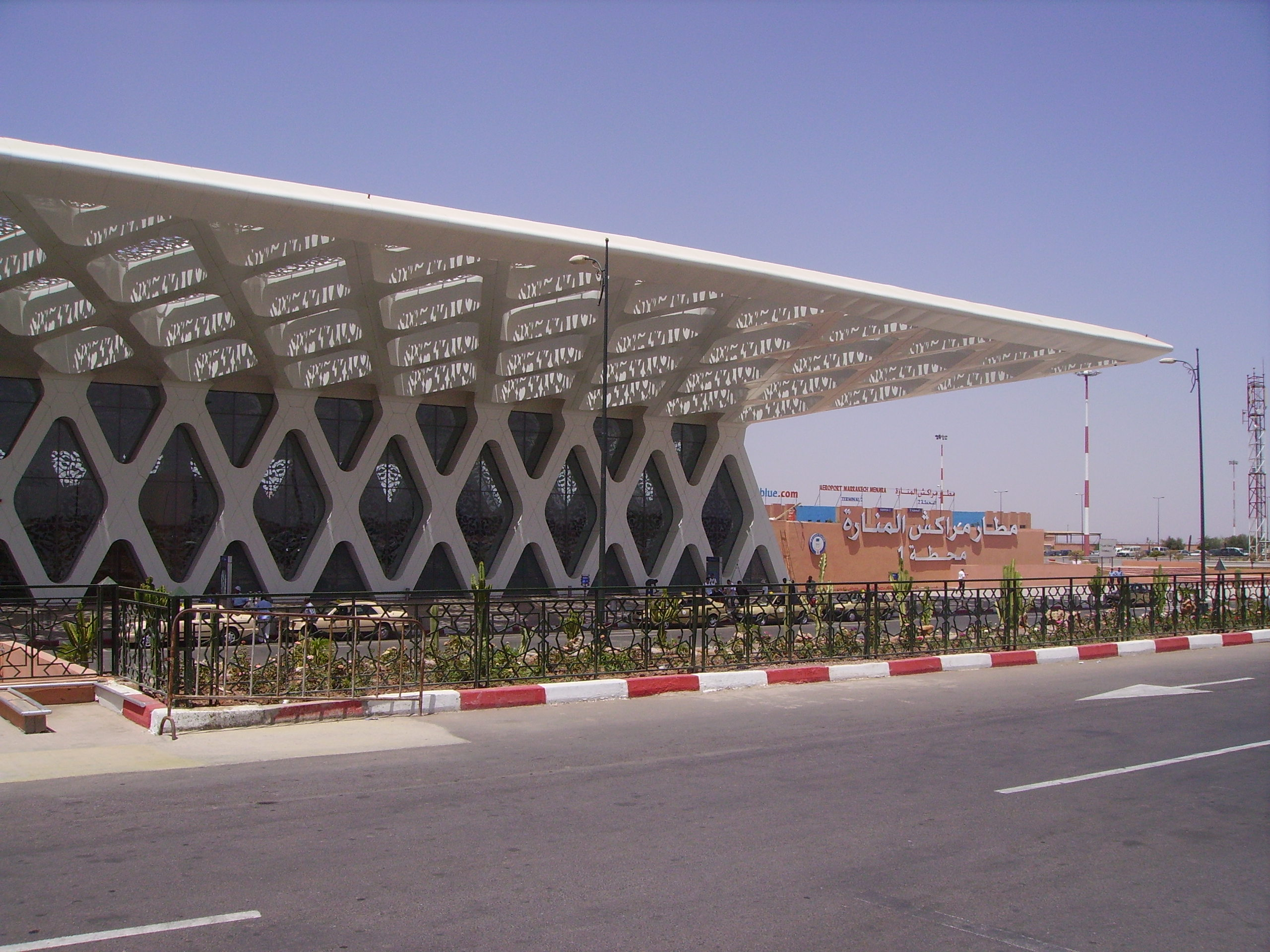 Photographie de l'aéroport Menara de Marrakech. A gauche le nouveau terminal 1 de 2008. A droite le terminal 2 de 2005.